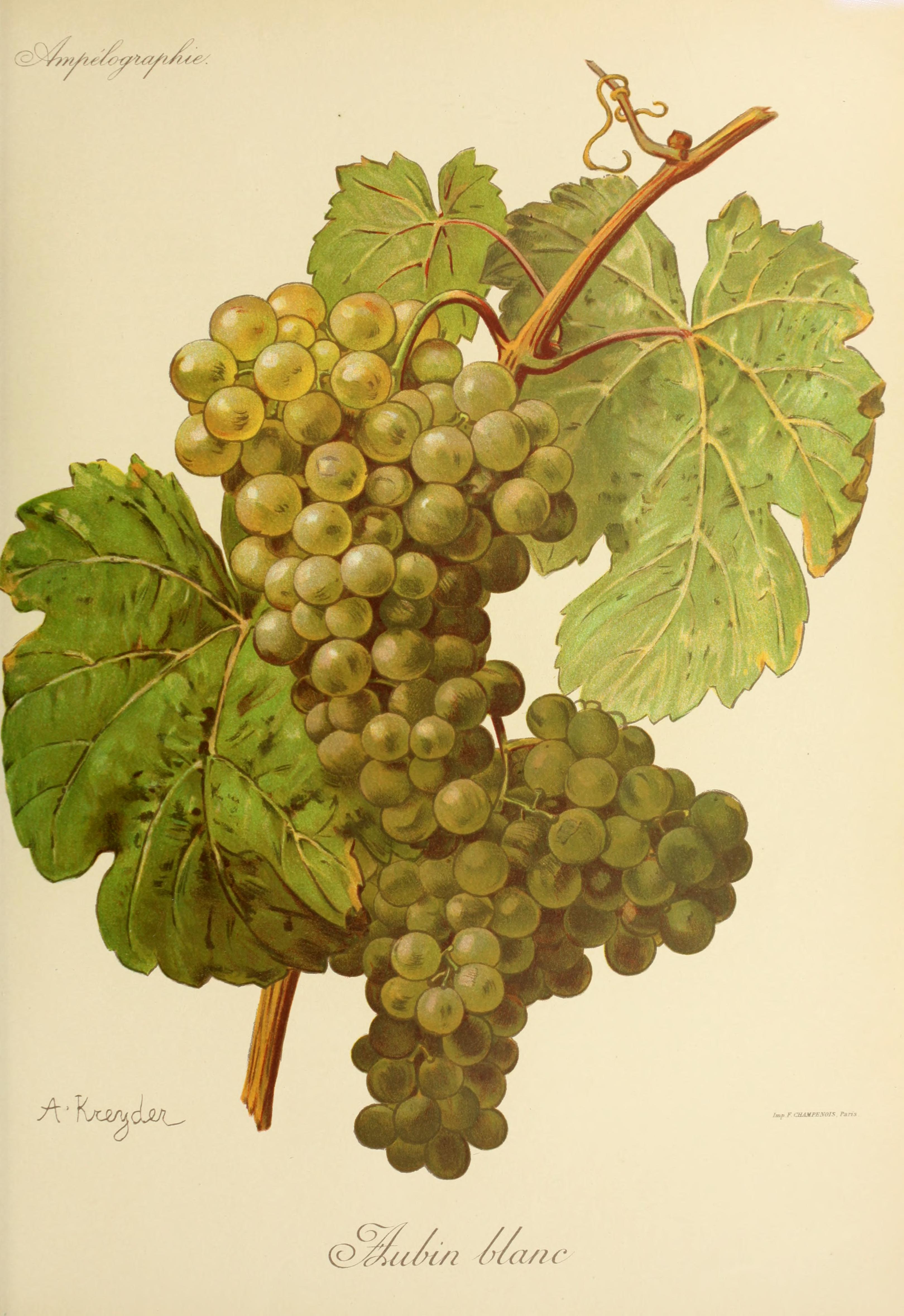 Illustration du cépage Aubin blanc par Alexis Kreyder dans l'ouvrage "Ampélographie : traité général de viticulture" publié sous la direction de P. Viala & V. Vermorel avec la collaboration de A. Bacon, A. Barbier, A. Berget [et al.] - Date de l'édition originale : 1901-1910